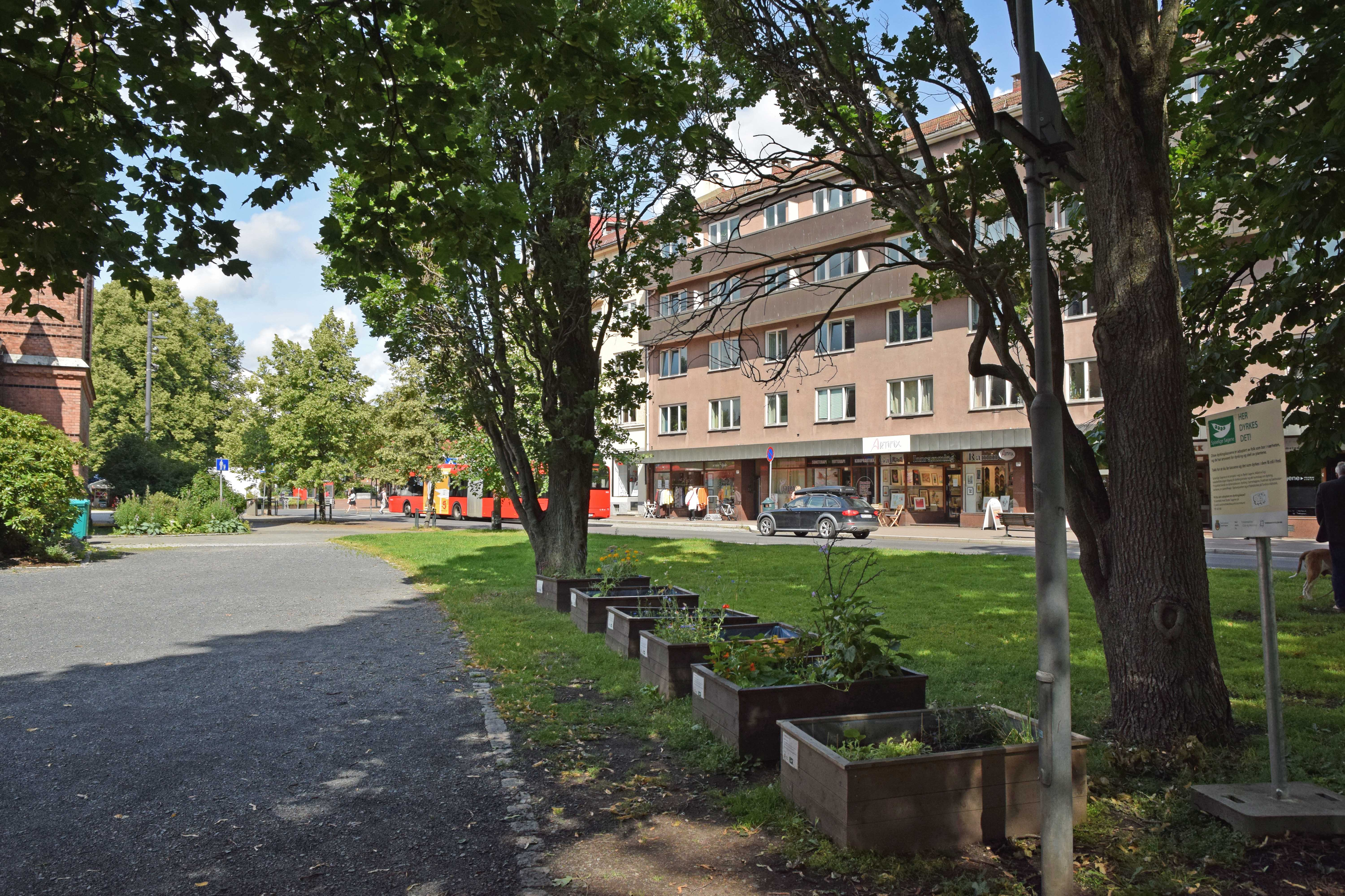 Sagene kirkepark ved Sagene kirke på Sagene i Oslo, med dyrkingskasser og Arendalsgata i bakgrunnen